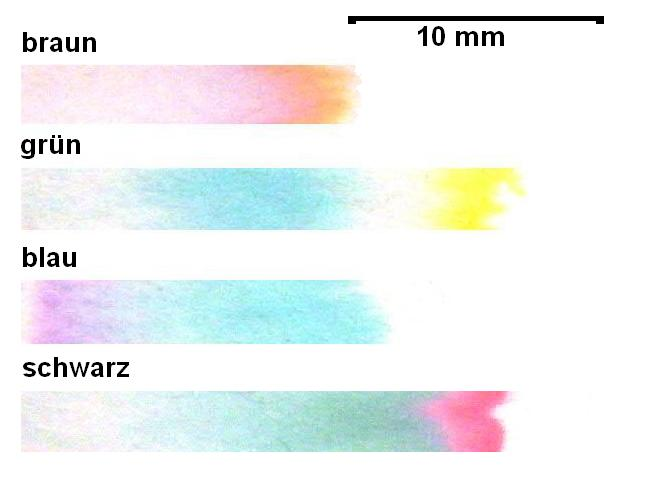 Papier-Chromatografen verschiedener Filzstifte mittels Zeitungspapier und Wasser